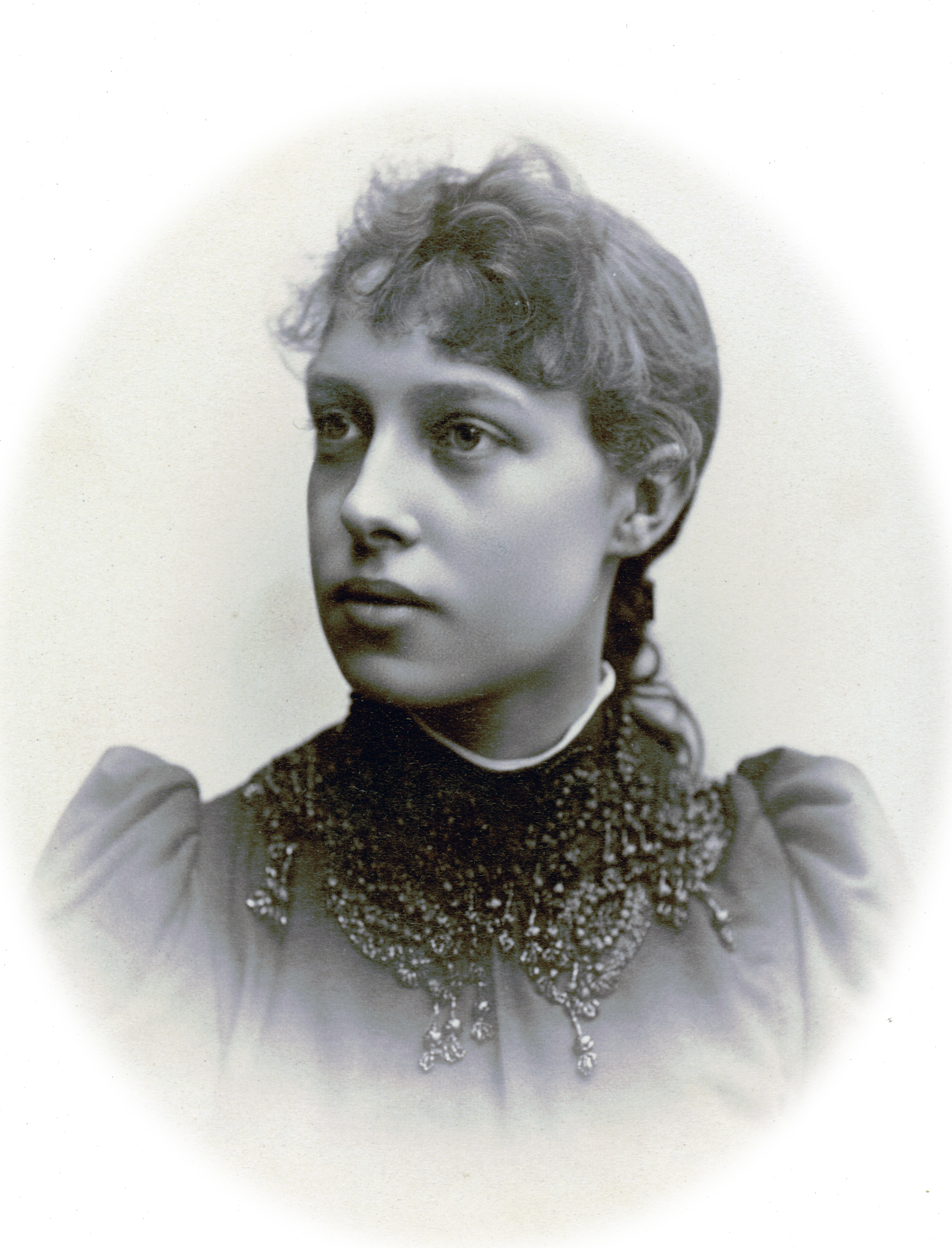 Gerda Lundequist, elev vid Dramatiska teatern 1889-90